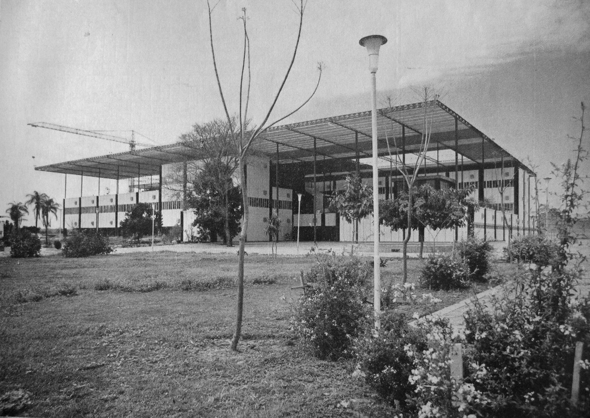 Vista de la construcción del Hospital San Vicente de Paul en Orán desde la plaza vecina